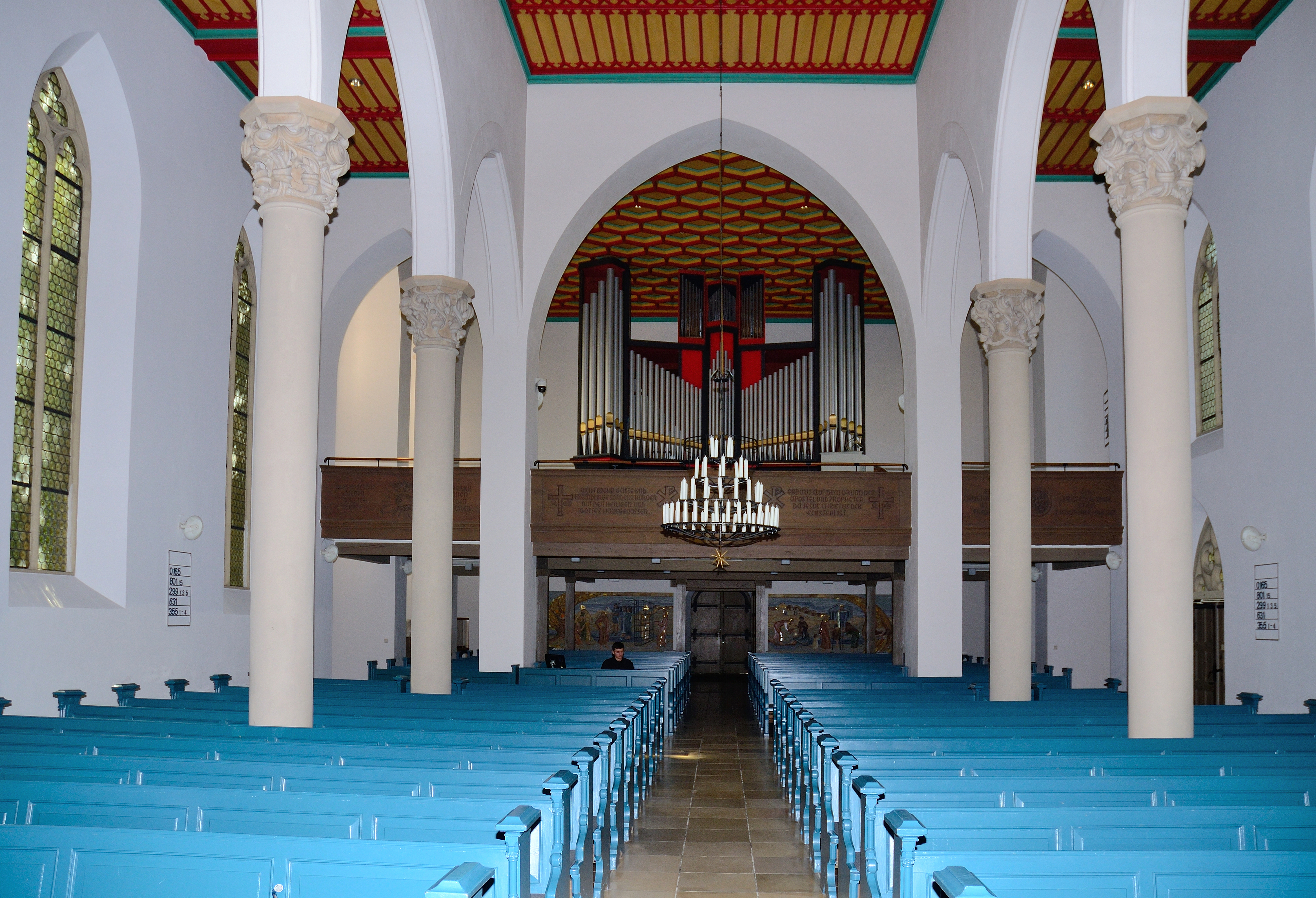 Westseite der St. Laurentiuskirche Neuendettelsau mit Empore und Orgel